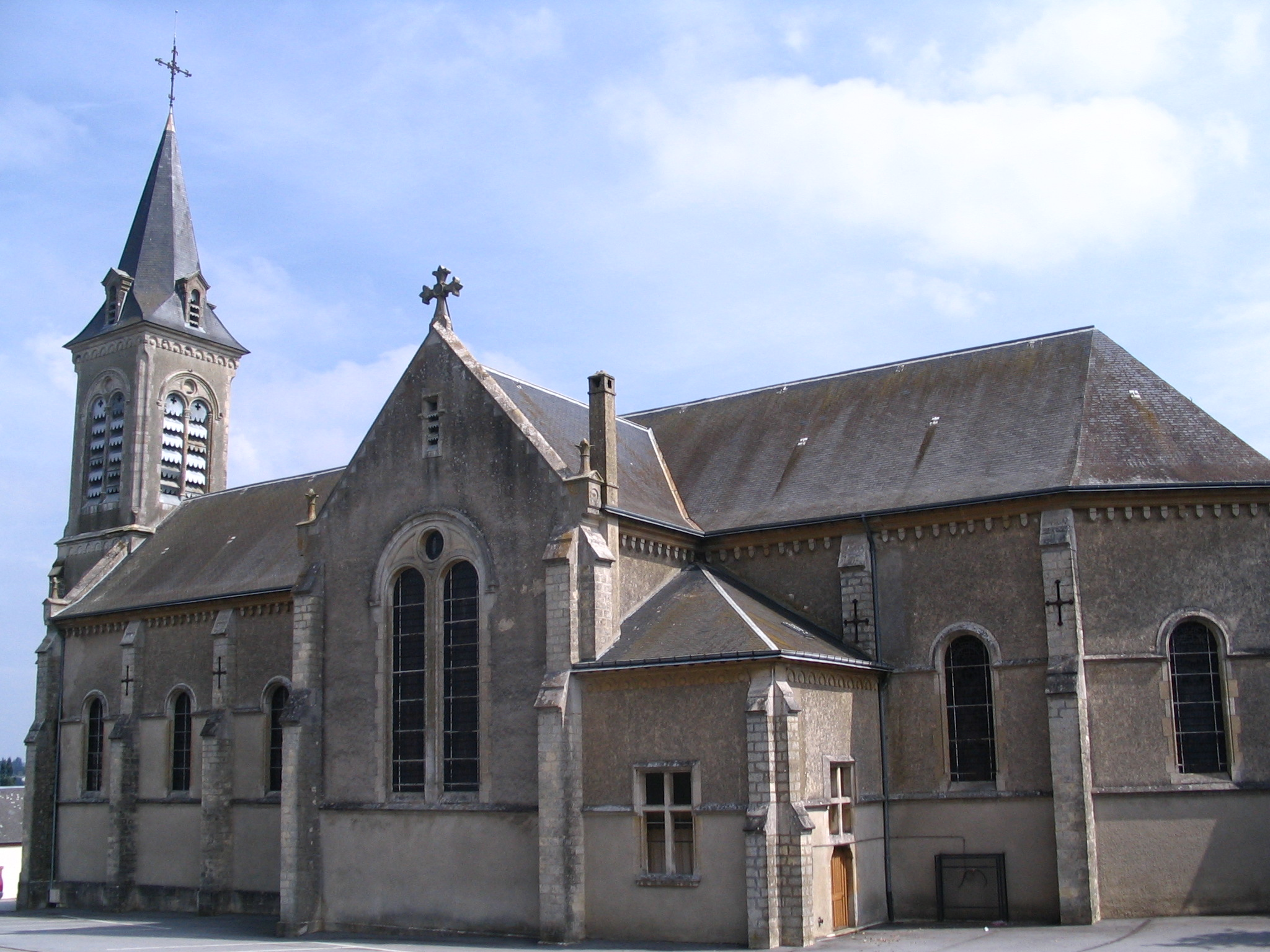 L'église de Sainte-Gauburge-Sainte-Colombe vue depuis le parking